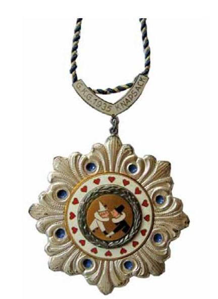 Orden des ersten Karnevalsprinzen von Hürth Knapsack aus 1935